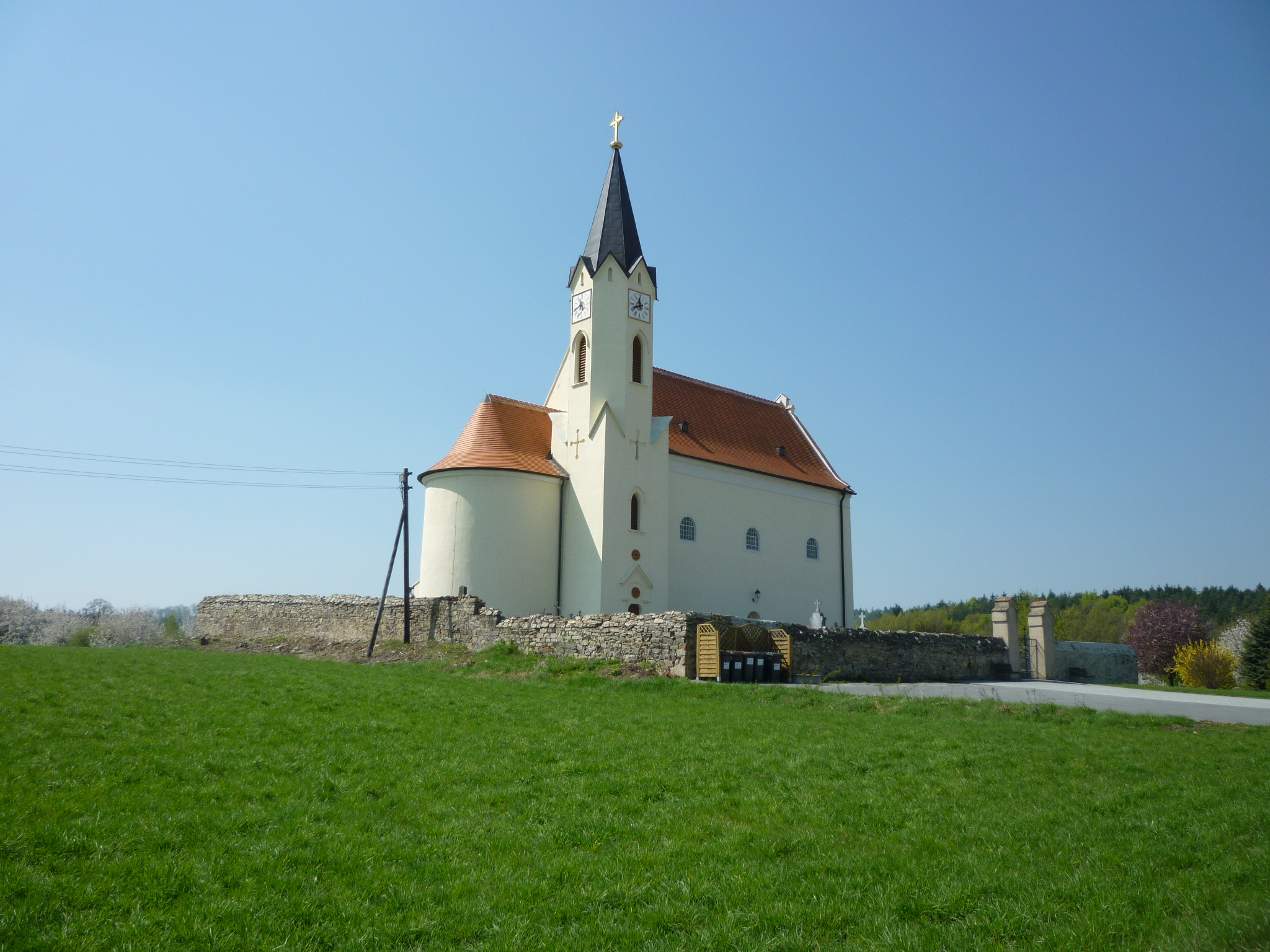 Fuglau, Gemeinde Altenburg, Nierderösterreich, Österreich. Blick auf die Filialkirche St. Nikolaus.